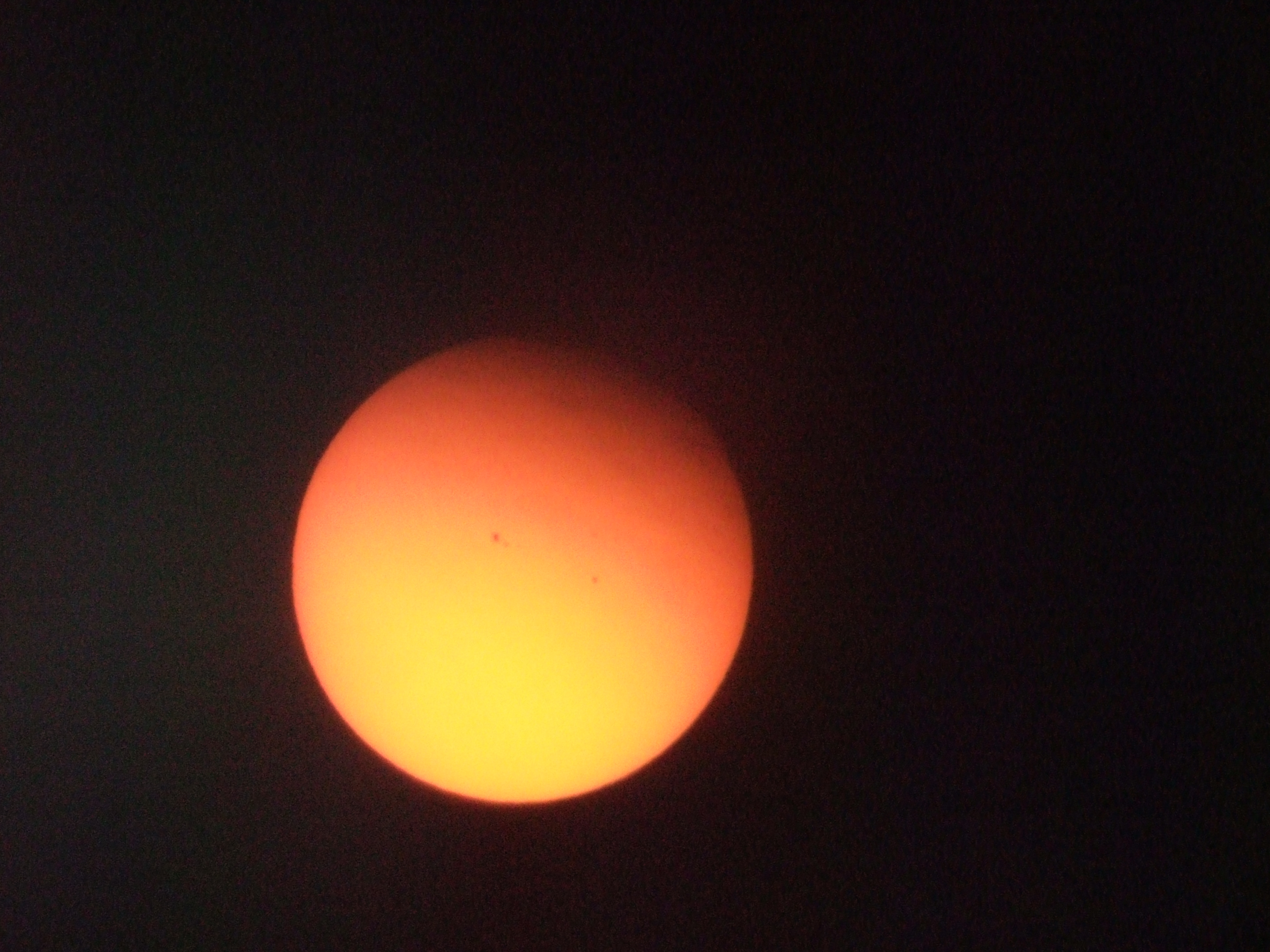 Le Soleil, au télescope